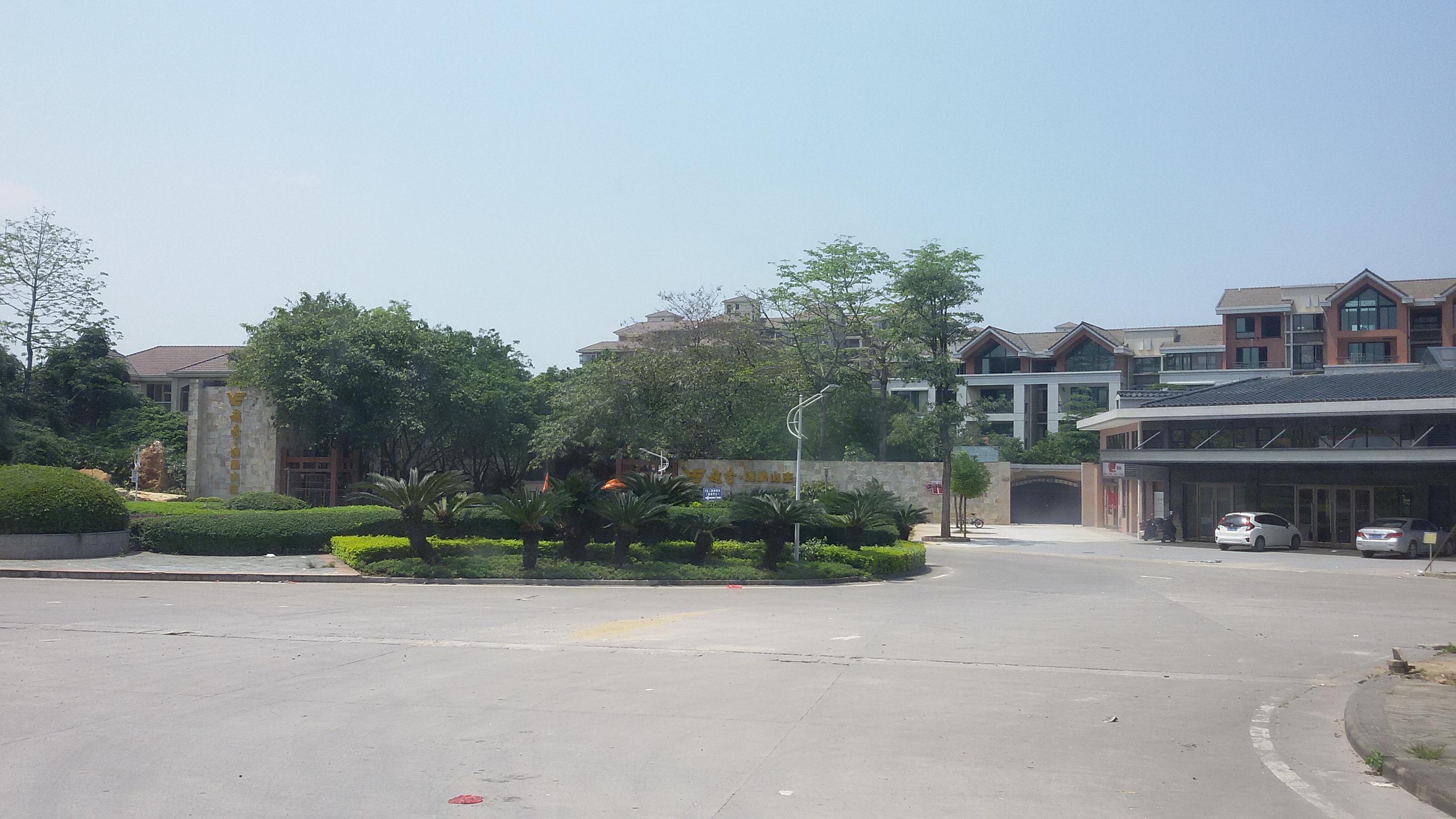 粵語: 越秀·逸泉山庄（从化）